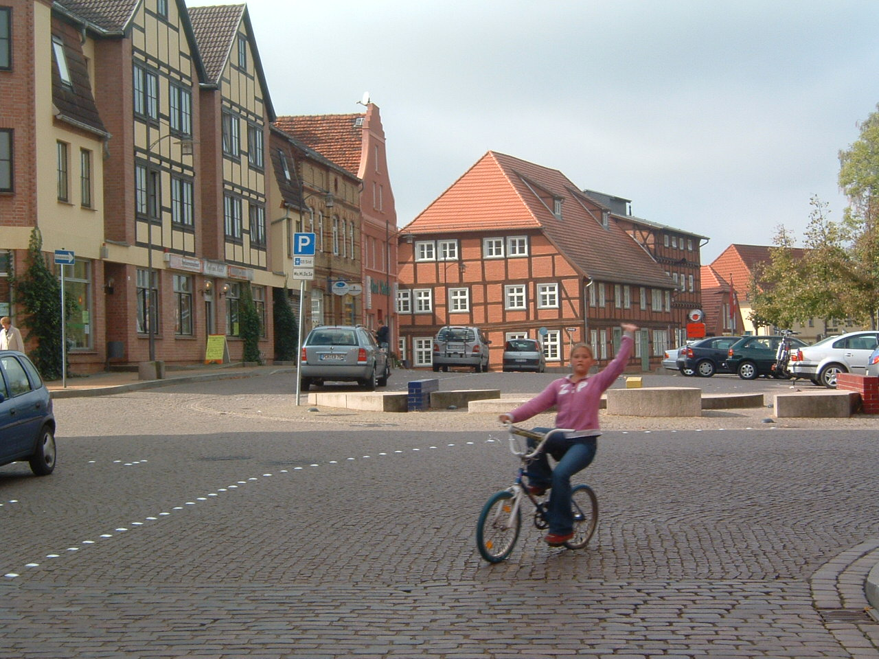 Marktplatz von Lübz in Mecklenburg